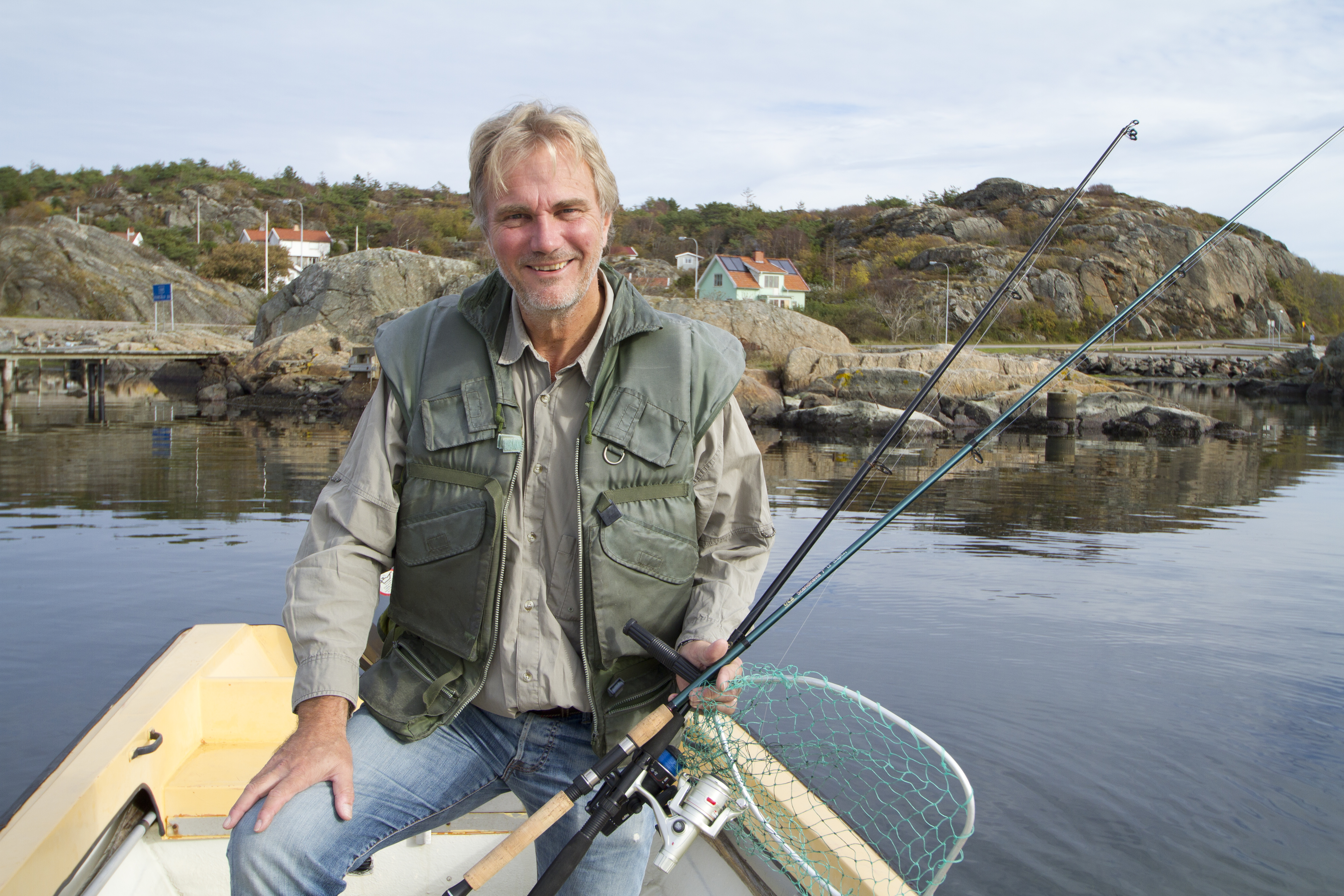 Programledaren Harald Treutiger.